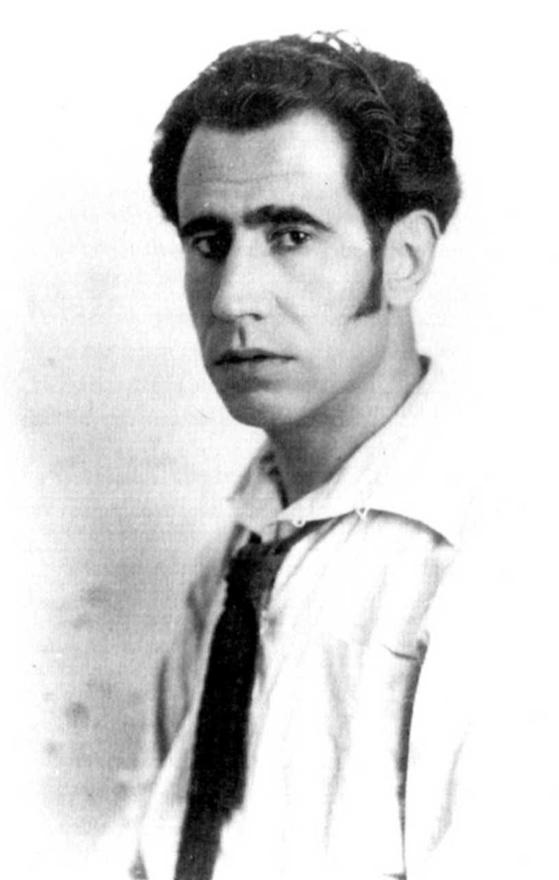 Imagem do anarquista espanhol Ramon Ancin.